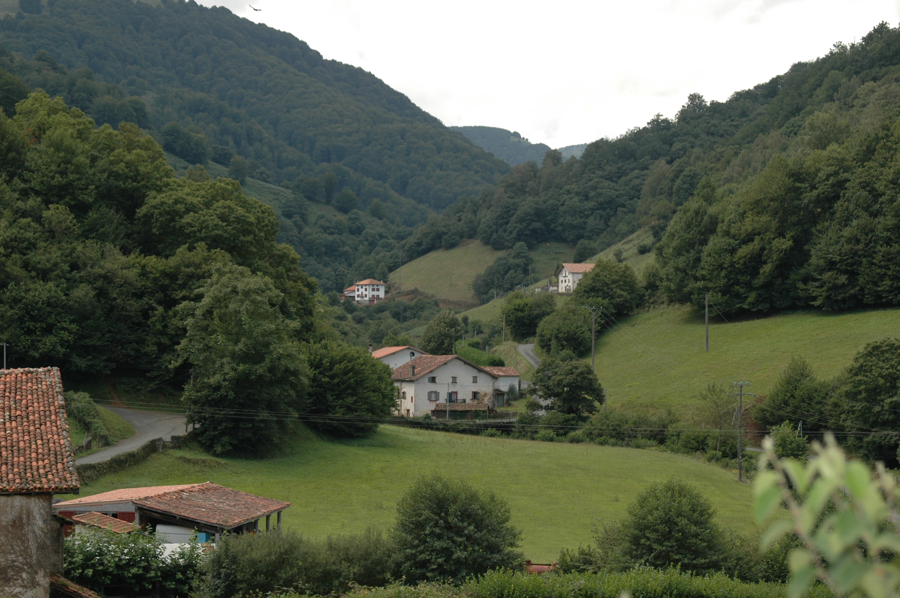 Urepel, vue sur la vallée des Aldudes